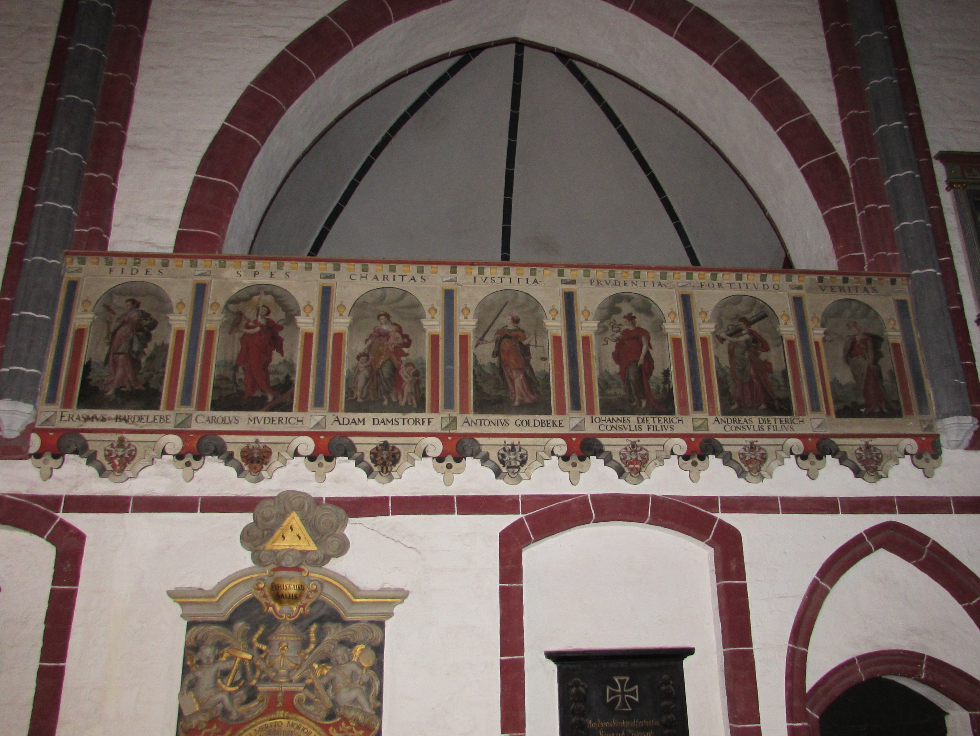 gotthardt brandenburg inneres 1